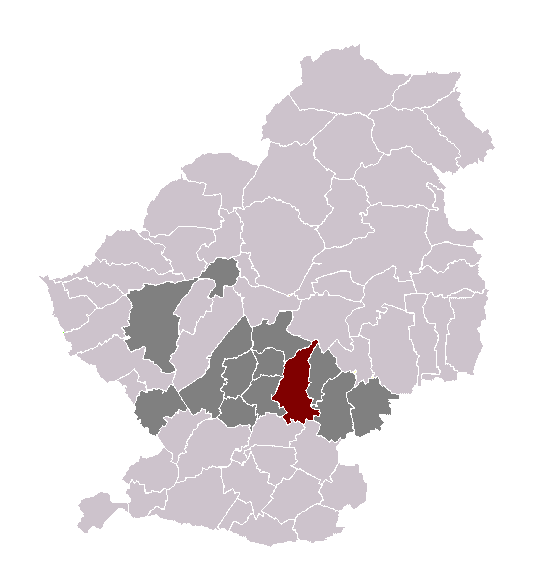 Masny dans son canton et son arrondissement